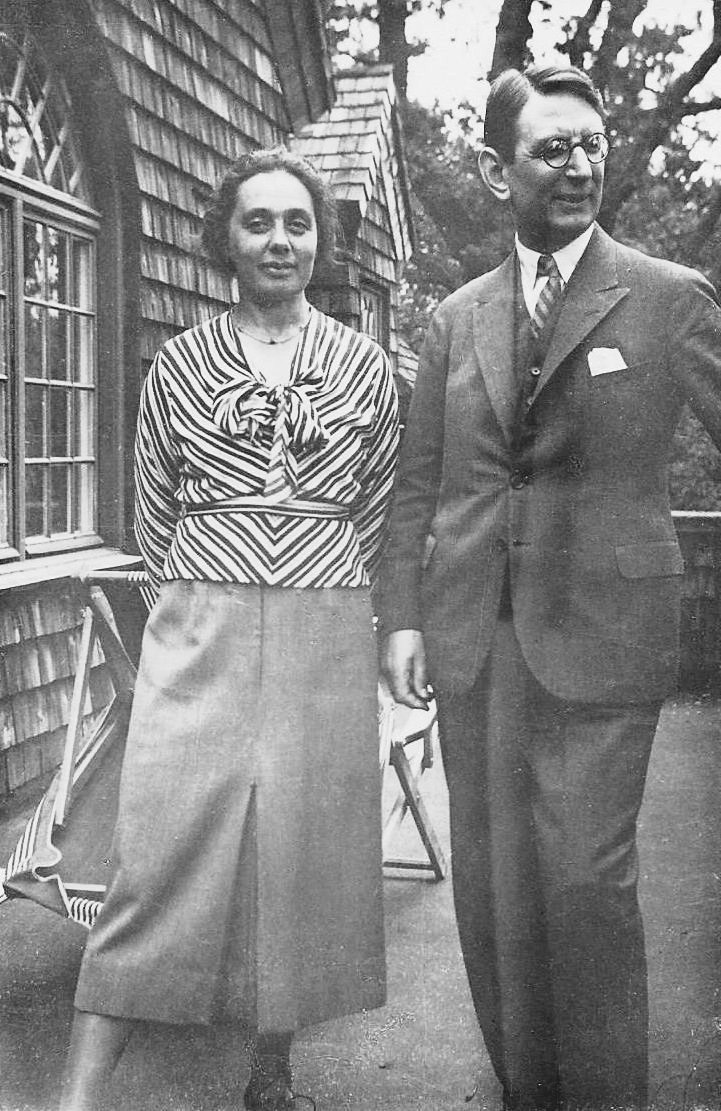 "Bekymrad Statsman våren 32 I alltför mycket måste stå."